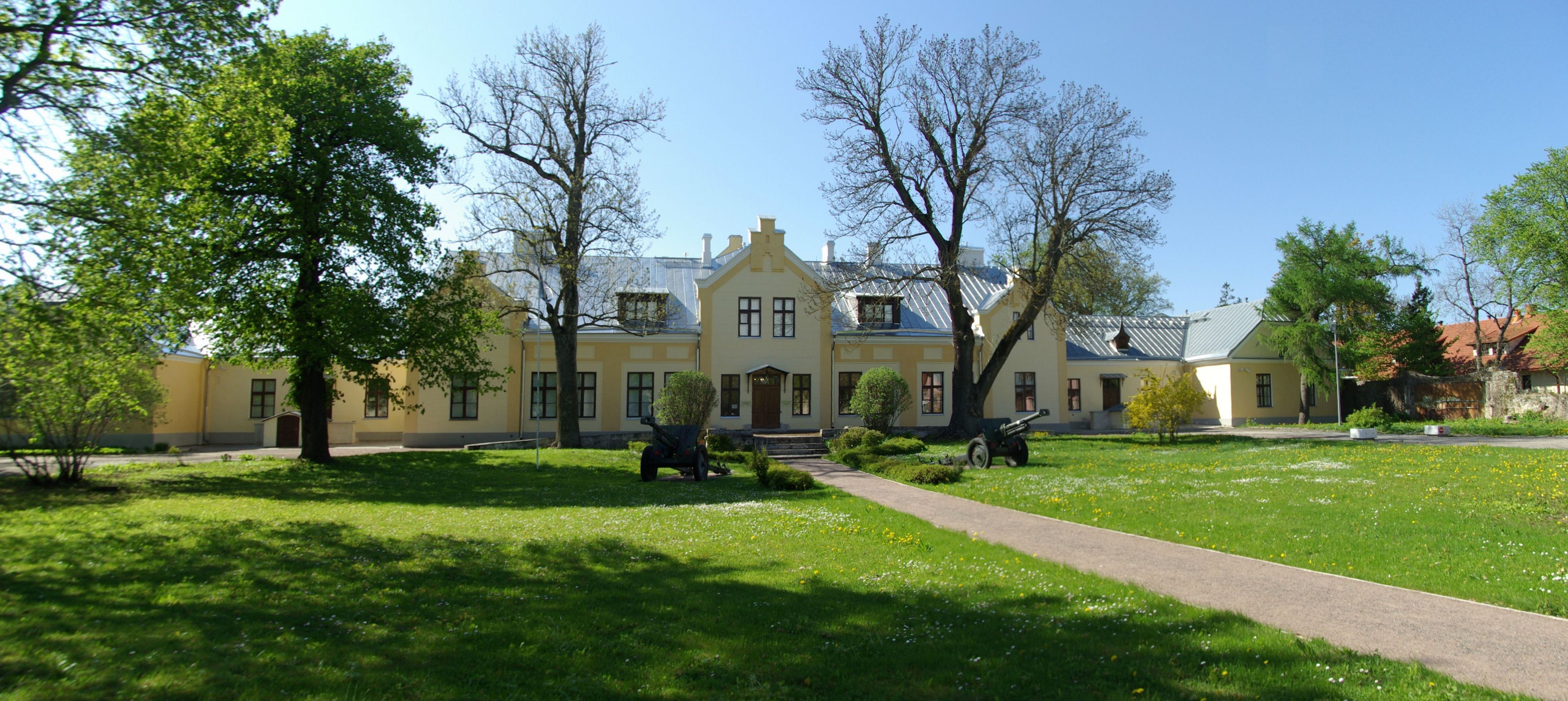 Asub Harjumaal Viimsi valla territooriumil